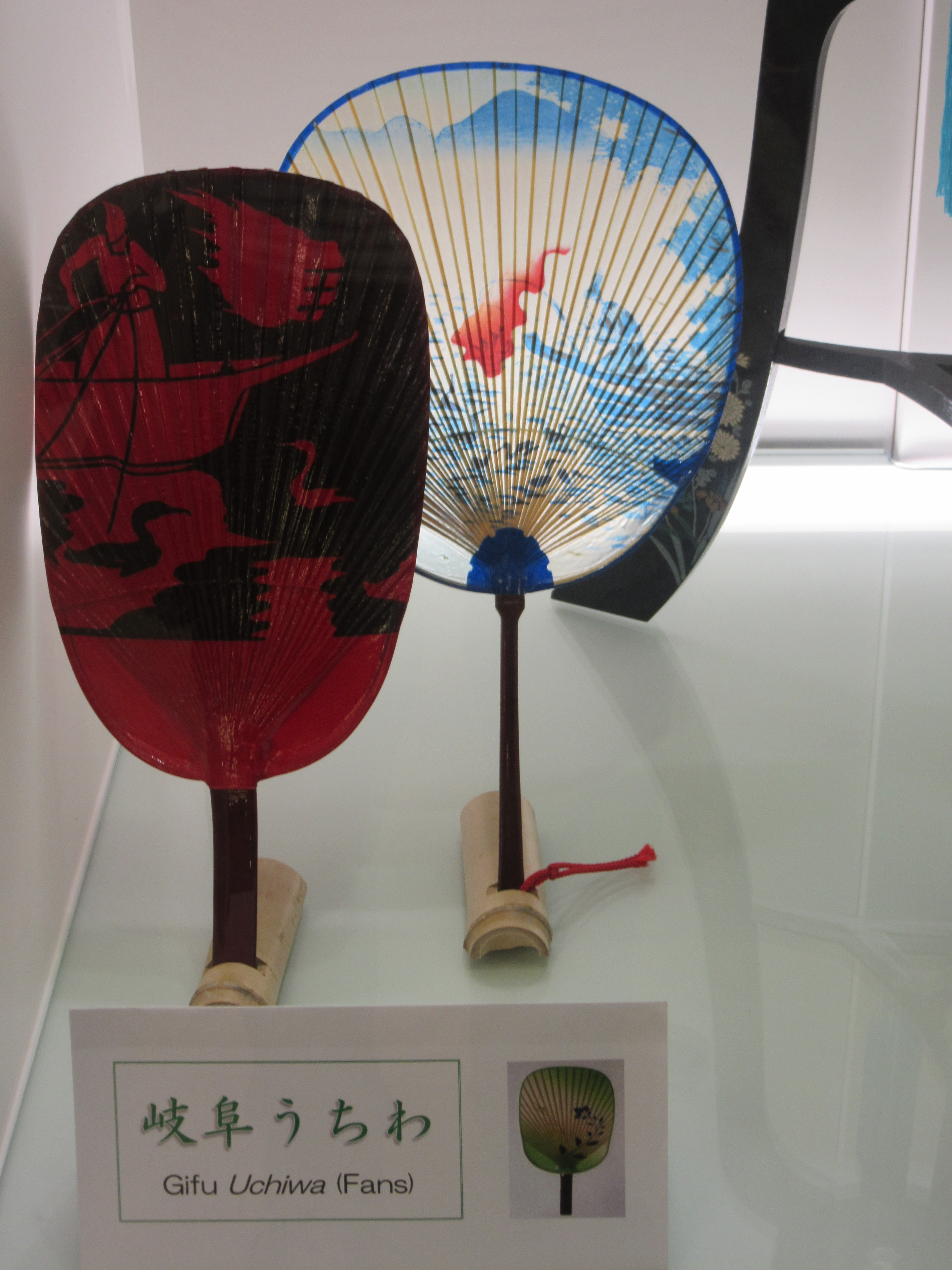 岐阜うちわ（岐阜駅観光案内所展示）